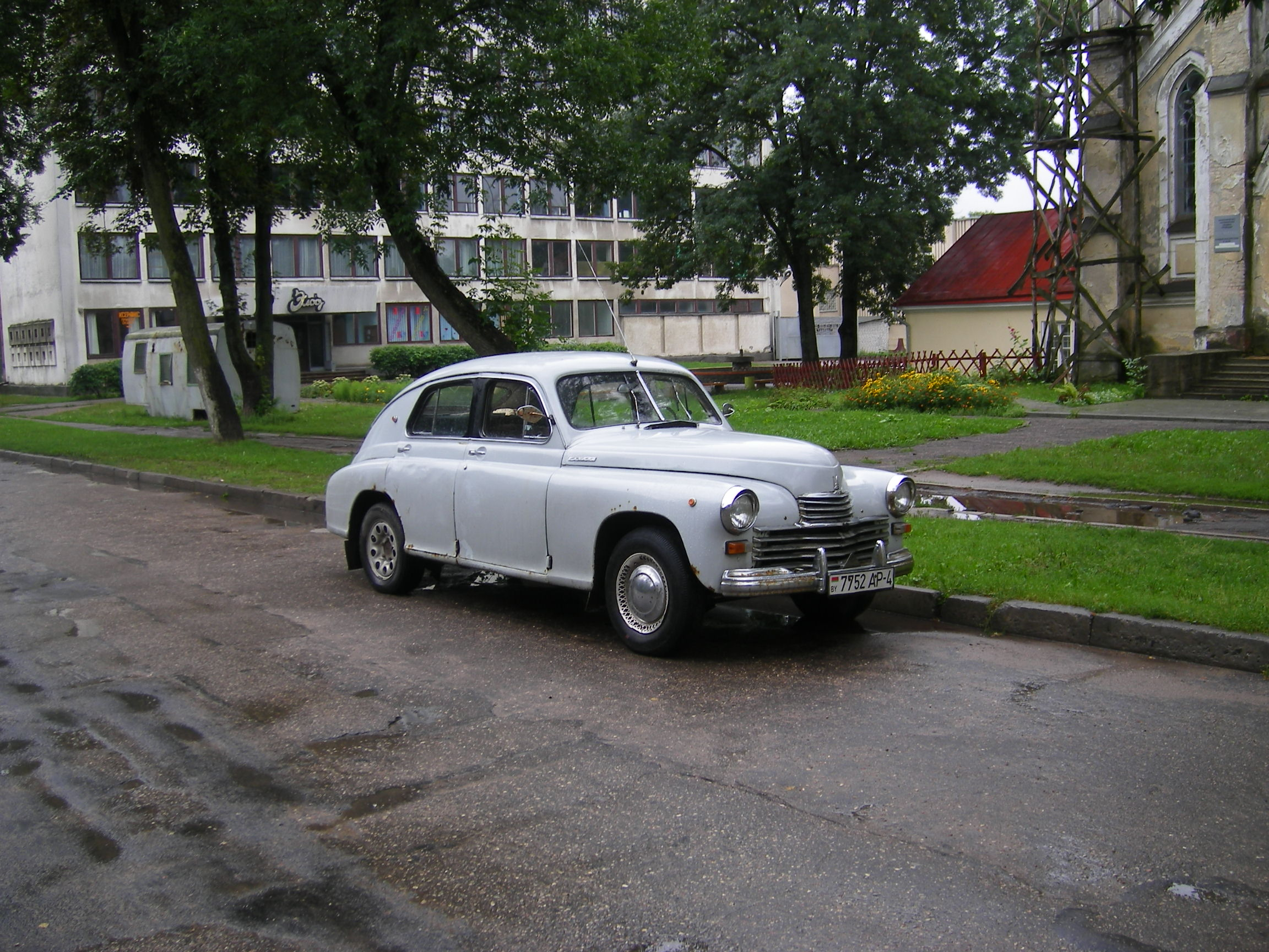 GAZ-M20 Pobeda car in Hrodna, Belarus